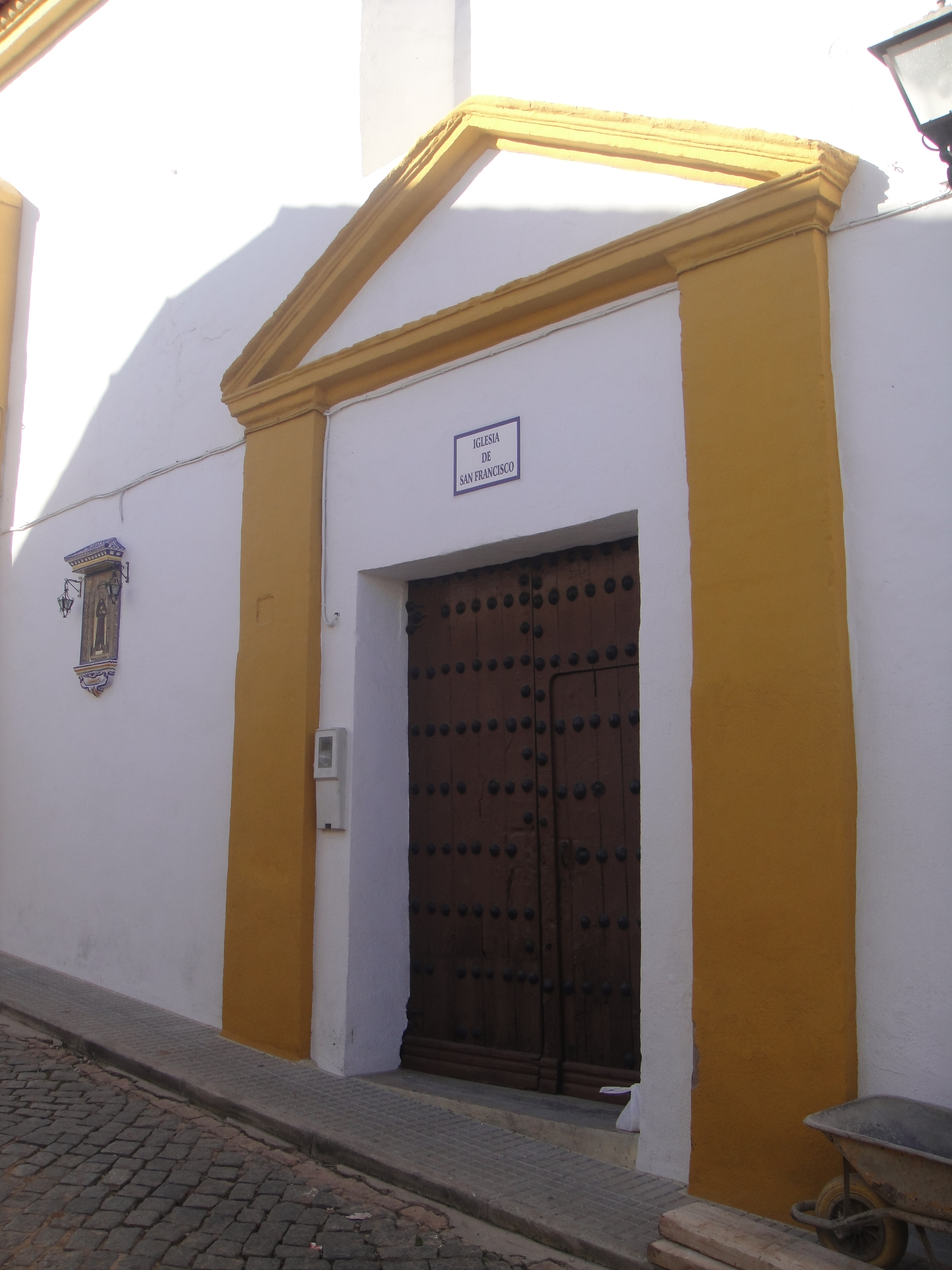 Exterior de la iglesia de San Francisco de Fuente Obejuna, provincia de Córdoba, (España).